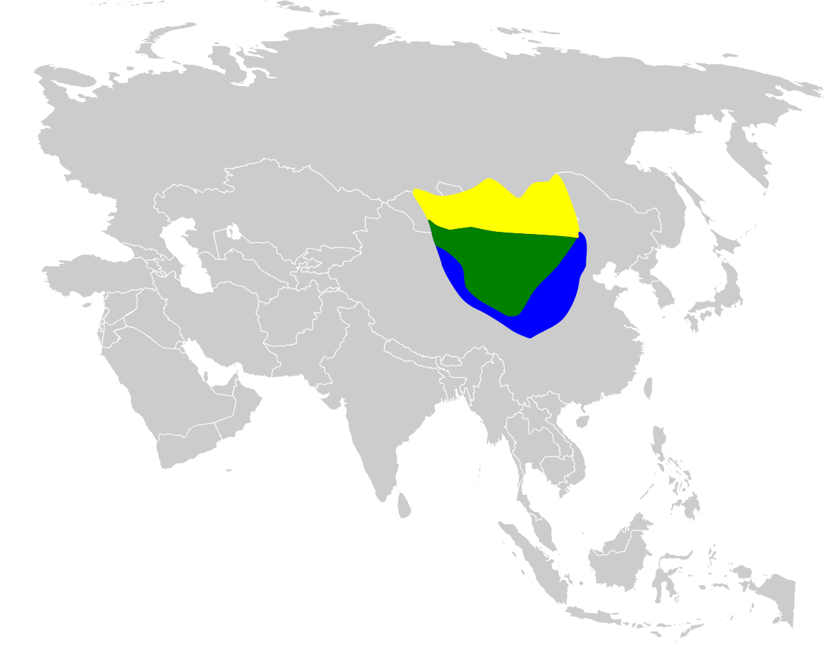 Melanocorypha mongolica distribution map, based on